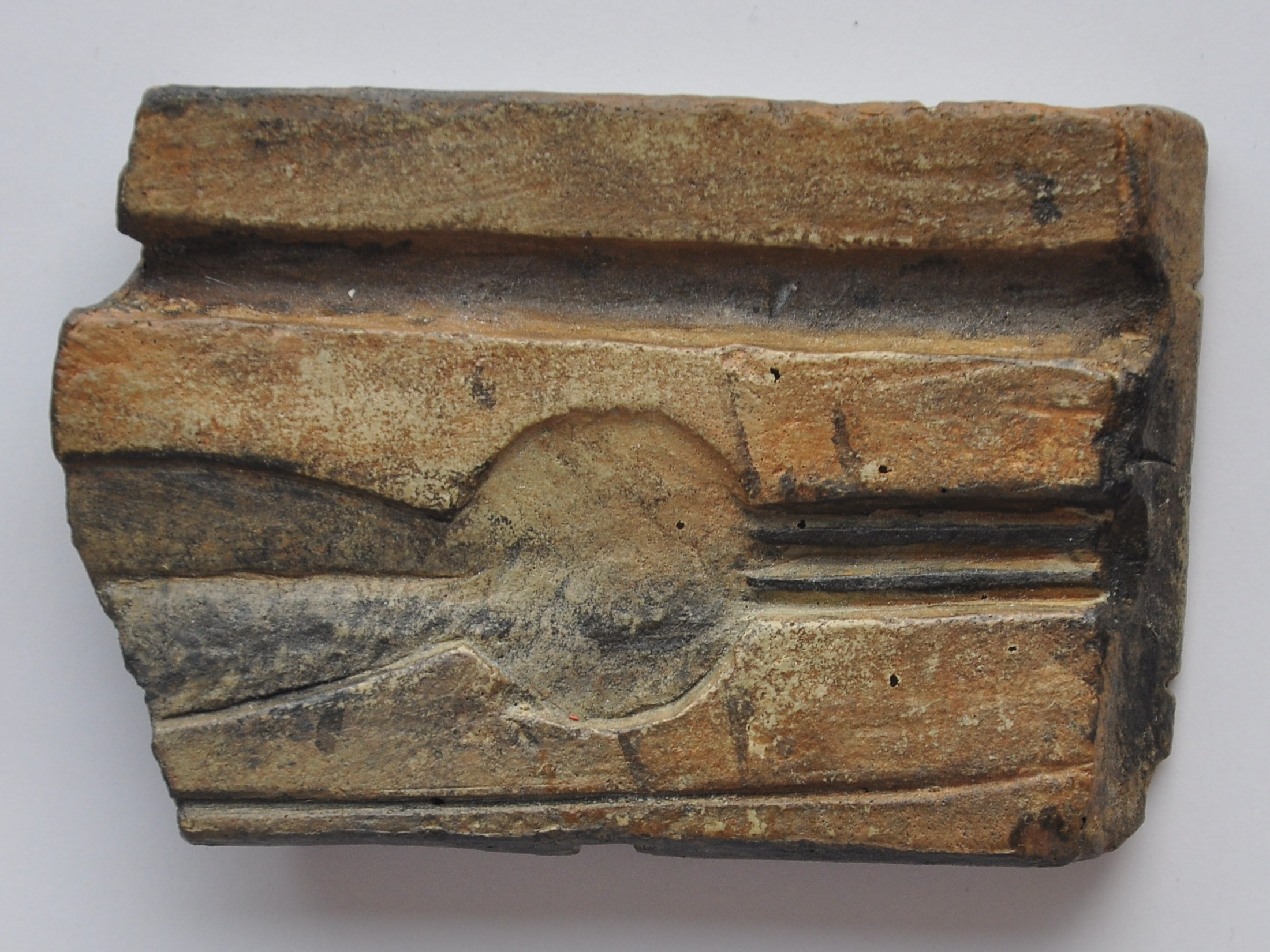 Fundstelle der Inselsiedlung (17. Jahrhundert v.Chr.) im Obersee im Bereich Technikum–Holzbrücke in Rapperswil (Switzerland) : Das Fundspektrum umfasst u.a. Keramik und Gewandnadeln, Dolche, Pfeilspitzen und Angelhaken aus Bronze sowie eine Gussform aus Speckstein für Rasiermesser vom alpinen Typ. Einige Bronzeobjekte sind Nachgüsse aus der bei der Siedlung geborgenen Gussform.